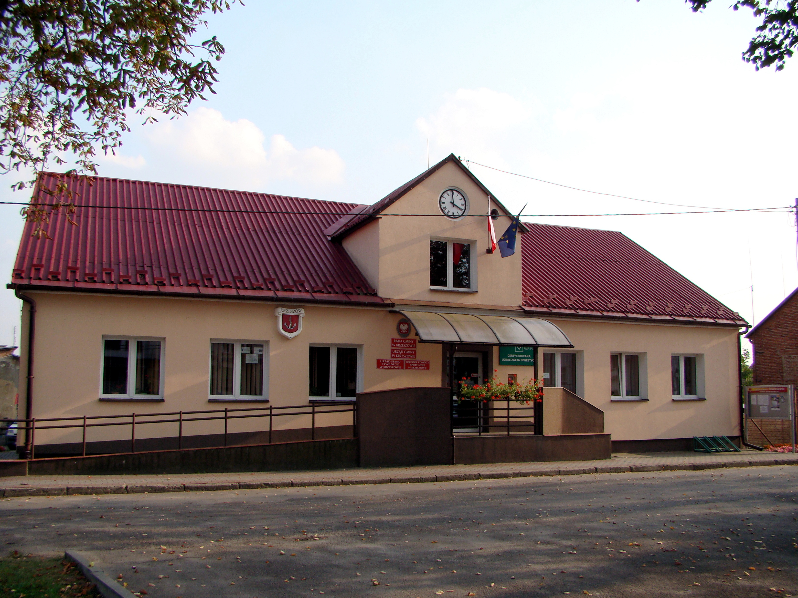 Krzeszów - Urząd Gminy